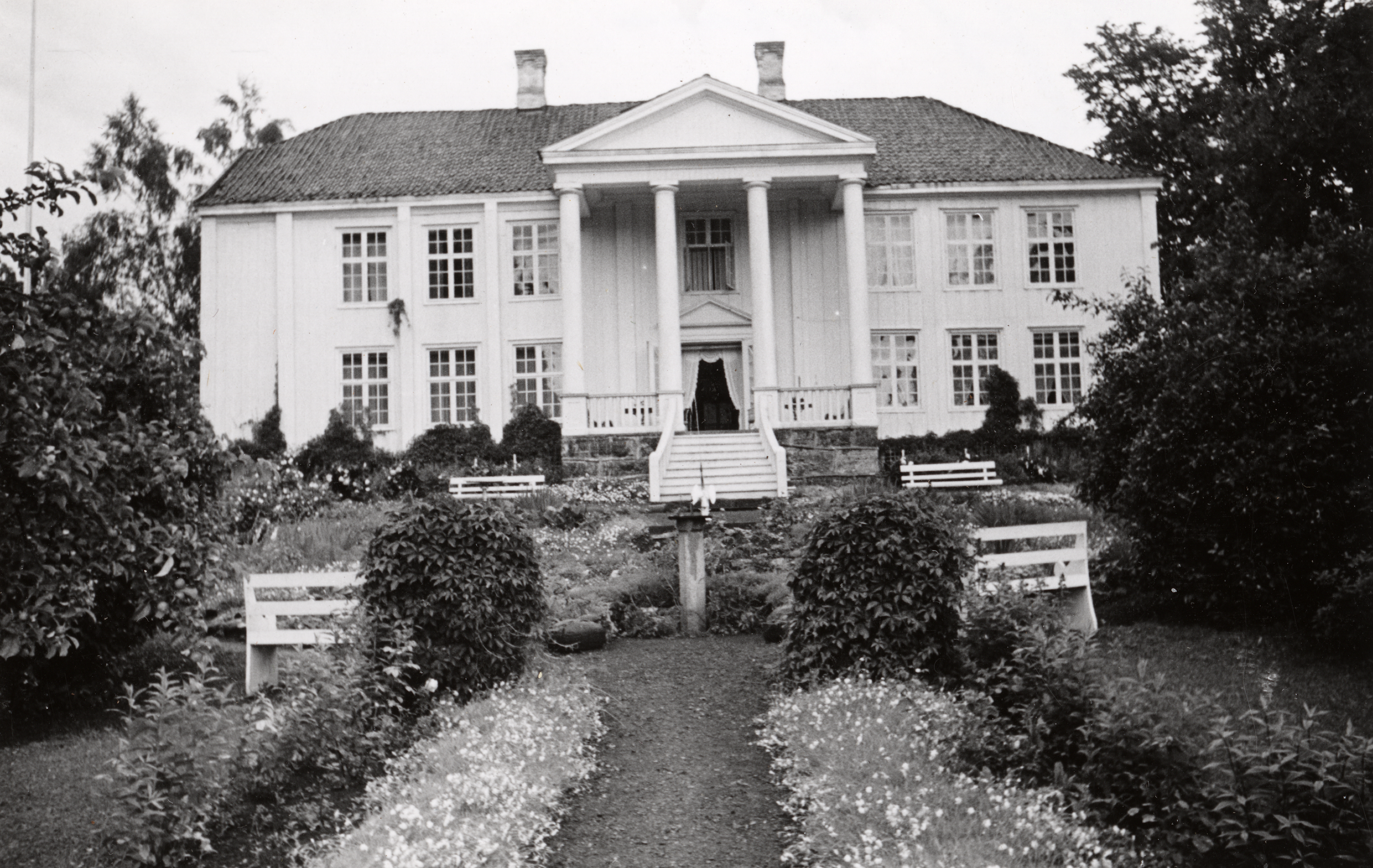 Rogneby i , Oppland